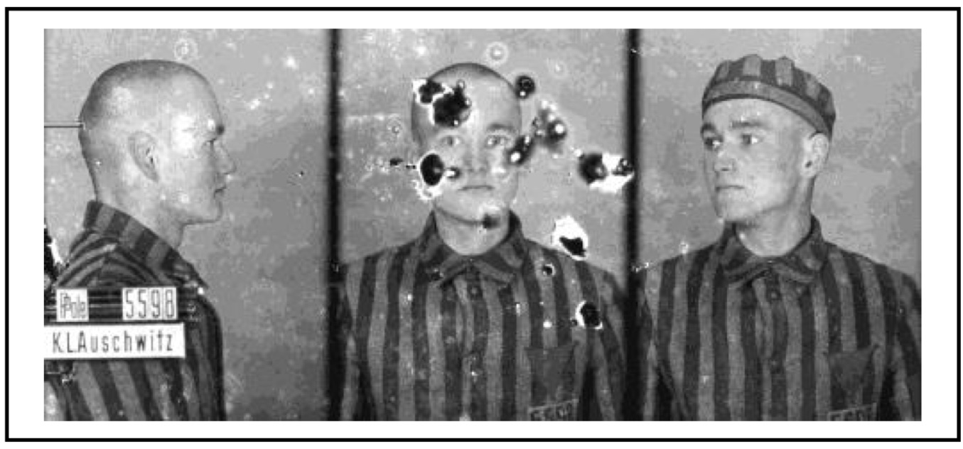 Auschwitz-Häftling Jan Matuszek